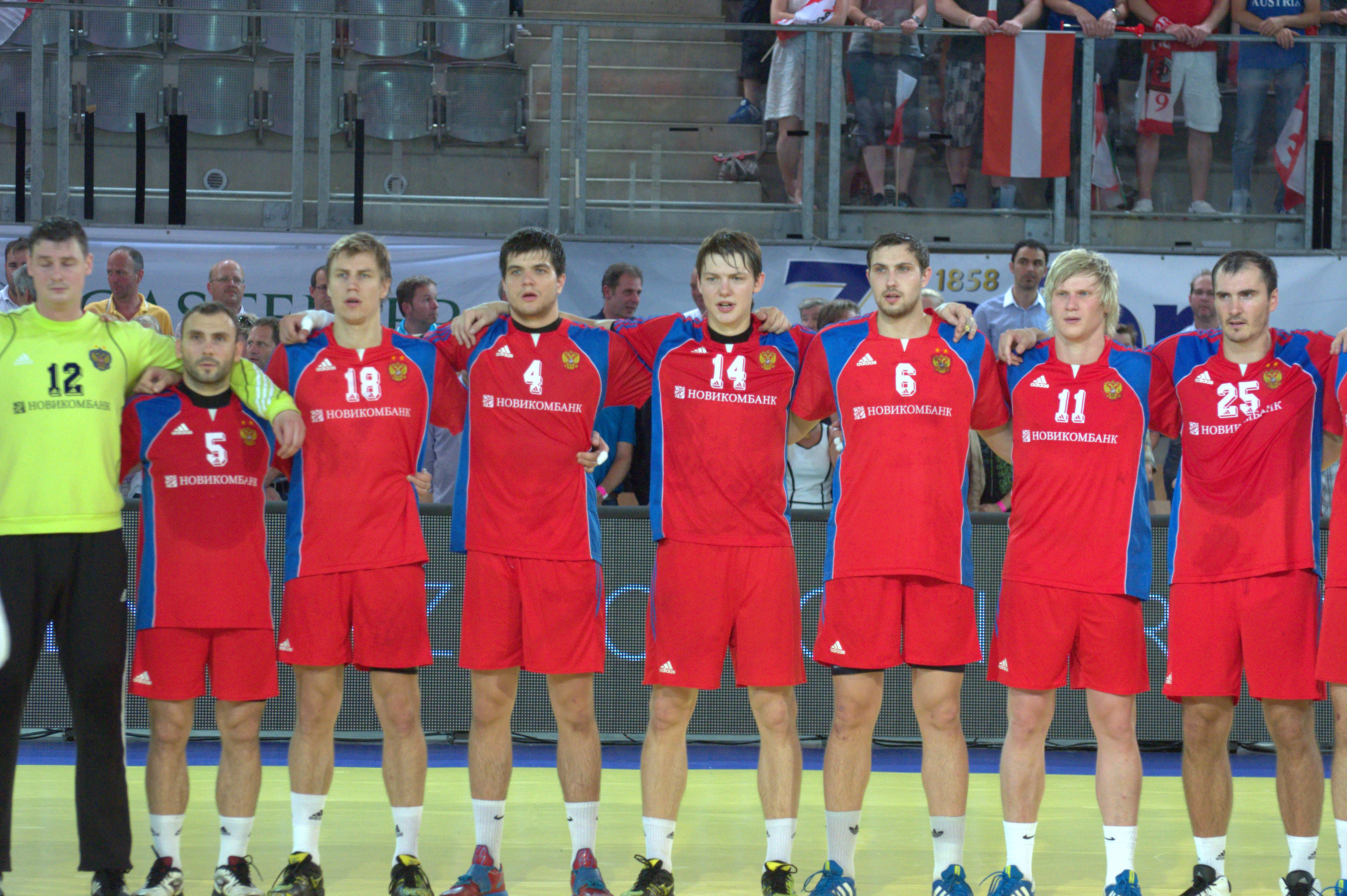 Handball EM Qualifikationspiel Österreich vs. RusslandRussische Mannschaft